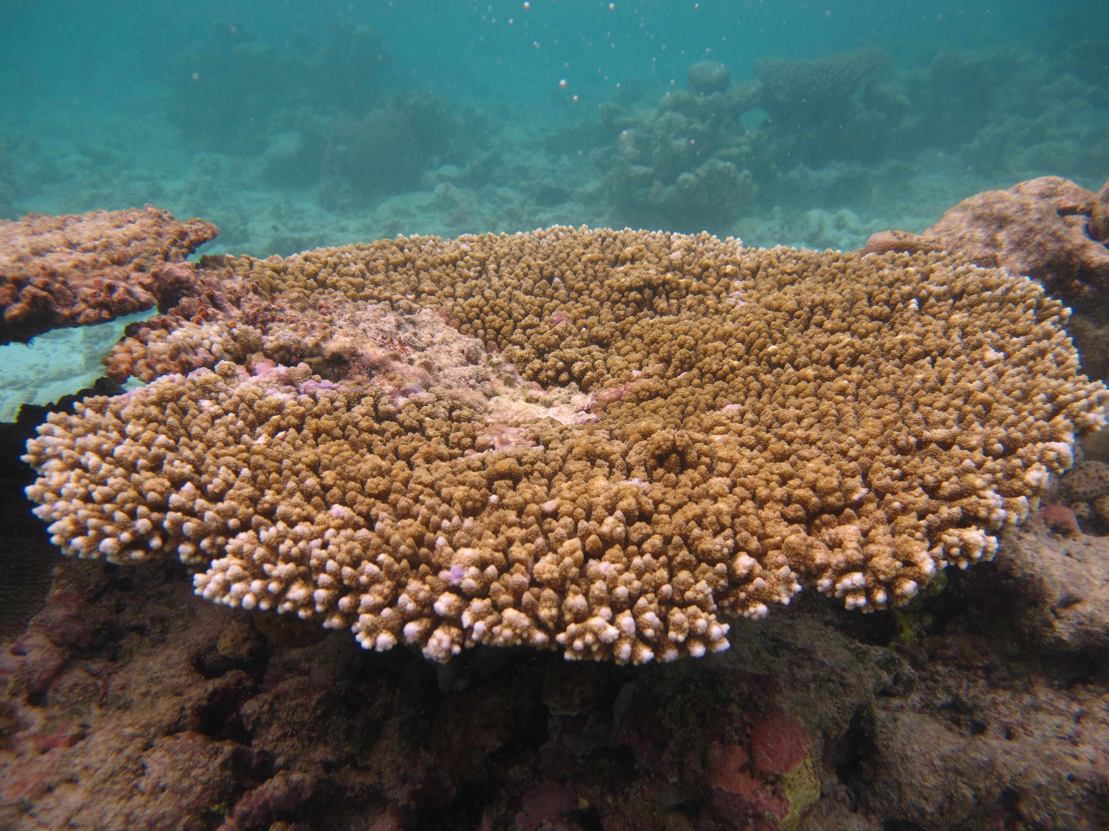 Une colonie de corail Acropora hyacinthus aux Maldives (atoll de Baa).